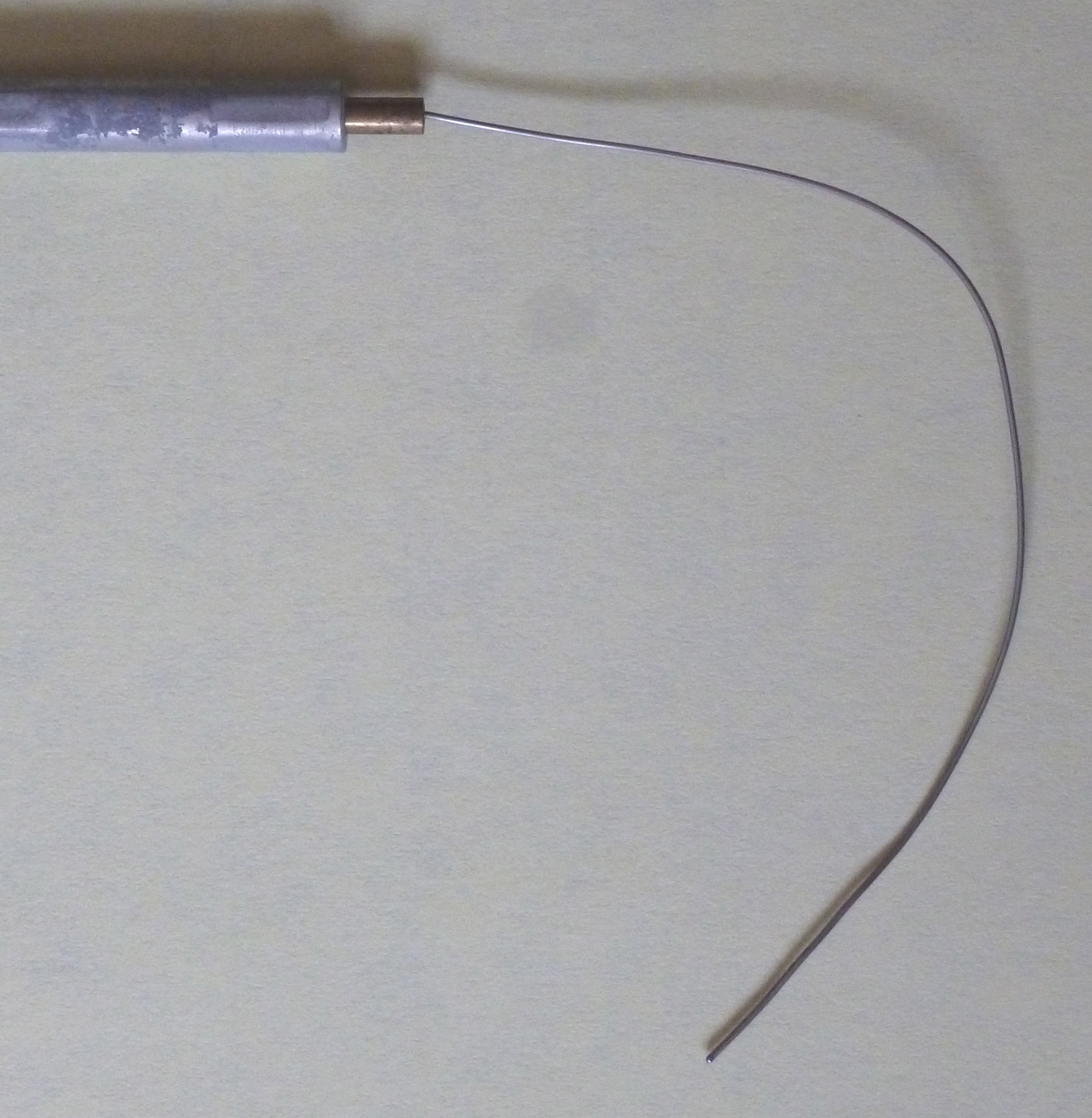 Biegbares Mantelthermoelement in Edelstahlschutzrohr